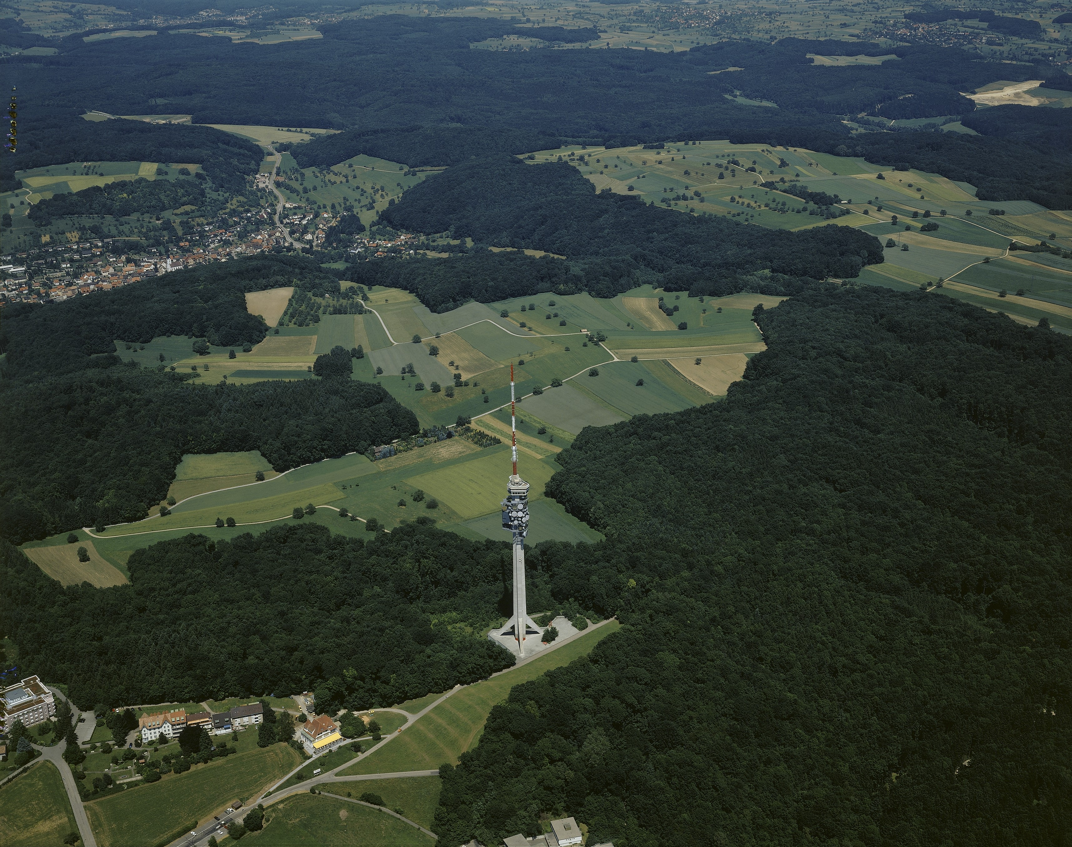 Luftbild des Fernsehturm St. Chrischona aus südwestlicher Richtung